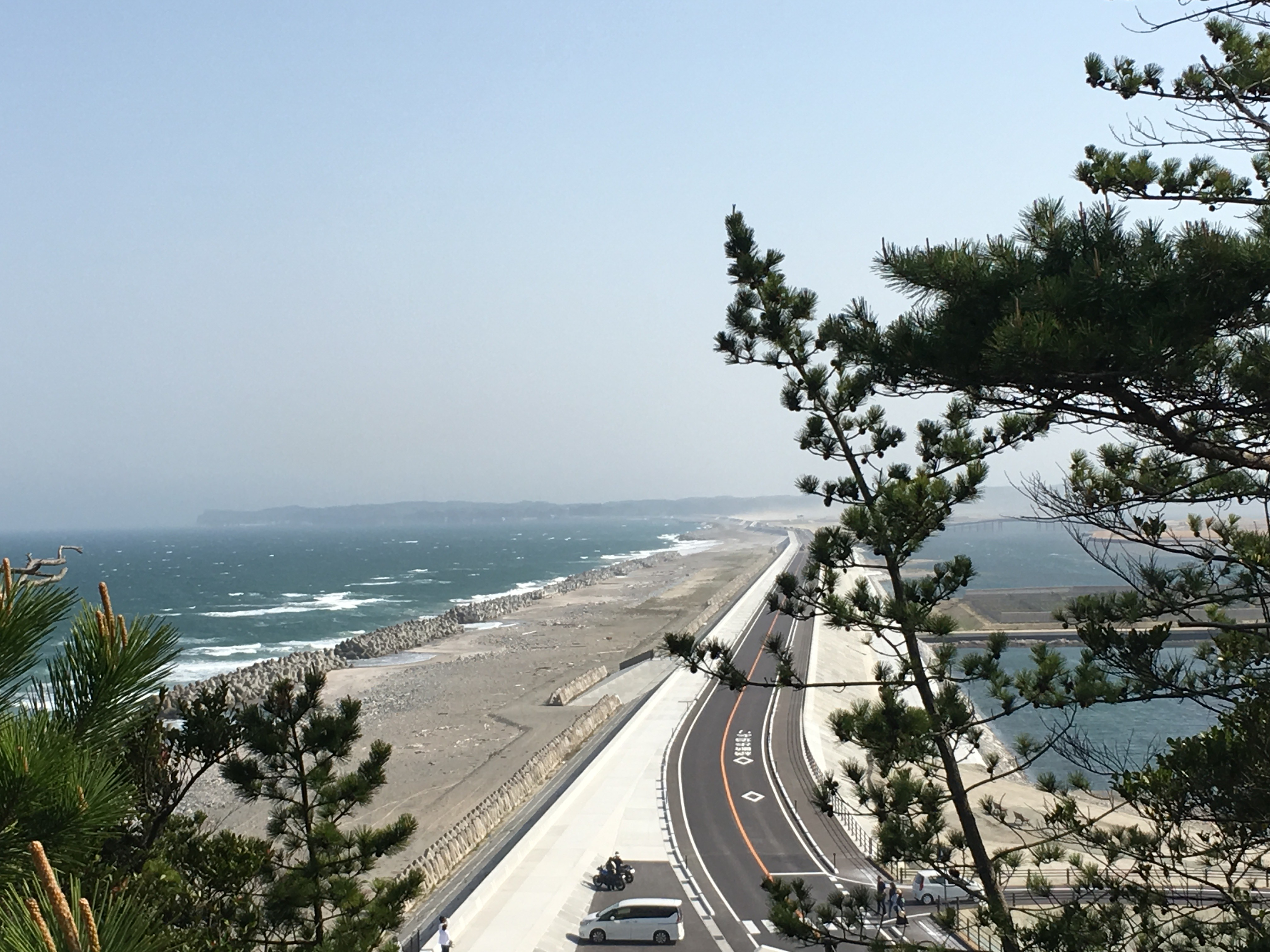 大洲海岸を鵜ノ尾岬から撮影